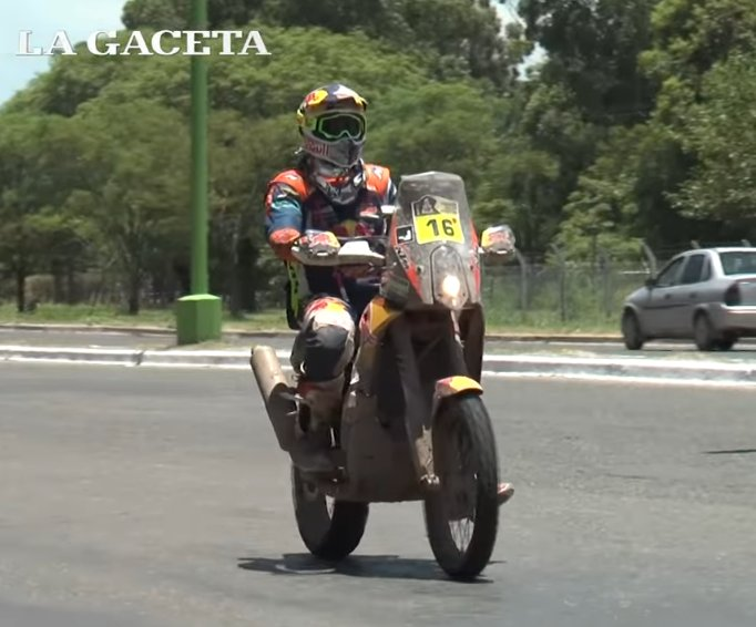 Dakar 2017. Etapa 3. Argentina. Ciudad de Tucumán. Matthias Walkner